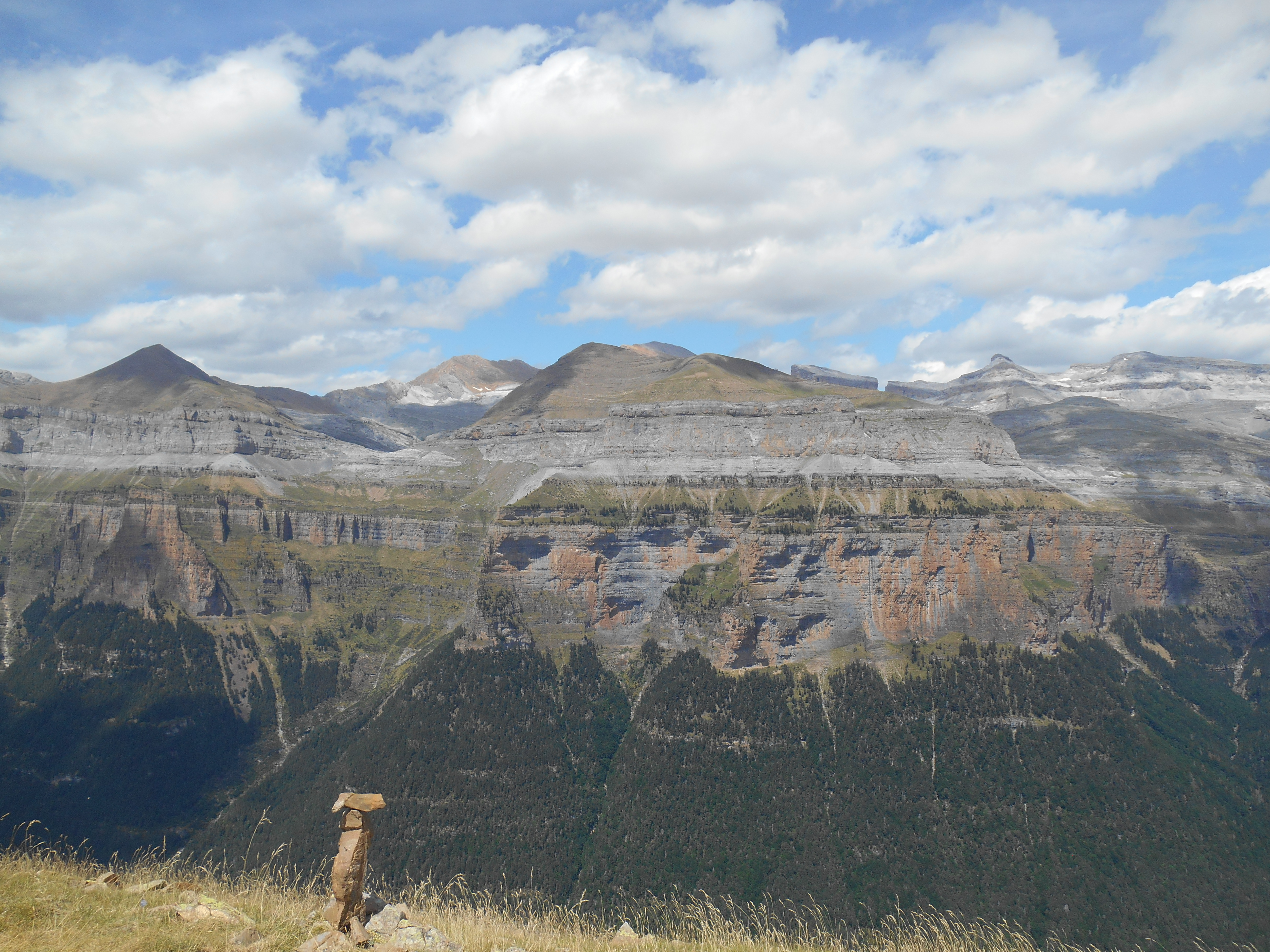 Aragonés: Anvista dende punta Acuta